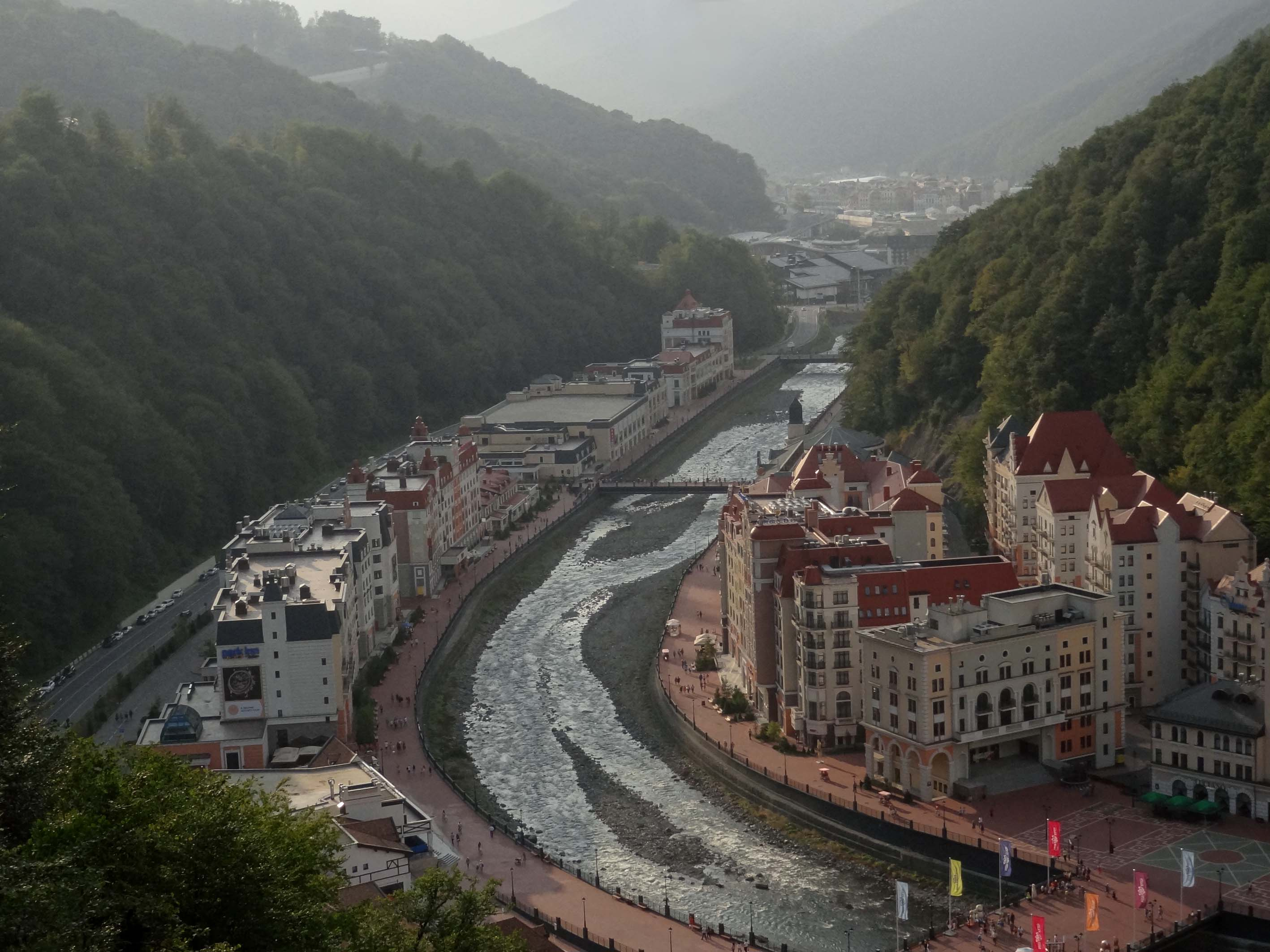 Гостиницы и другие сооружения комплекса на берегах реки Мзымта. Сентябрь 2014 года.